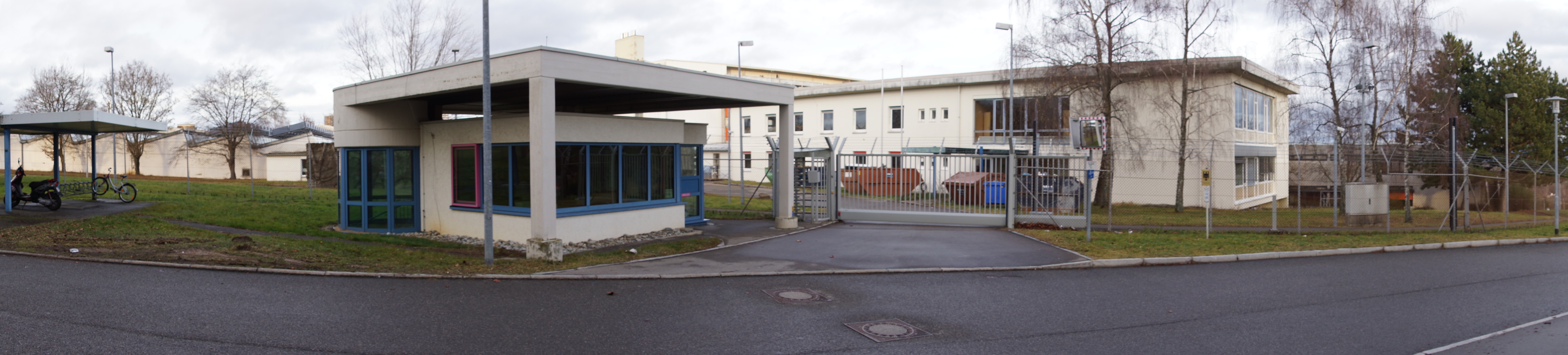 Pforte des Friedrich-Loeffler-Instituts in Tübingen. Die Gebäude wurden inzwischen abgerissen.